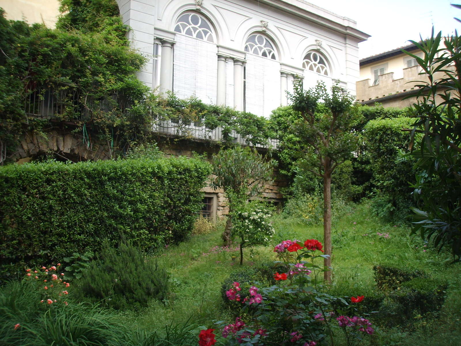 Palazzo antinori di brindisi, giardino